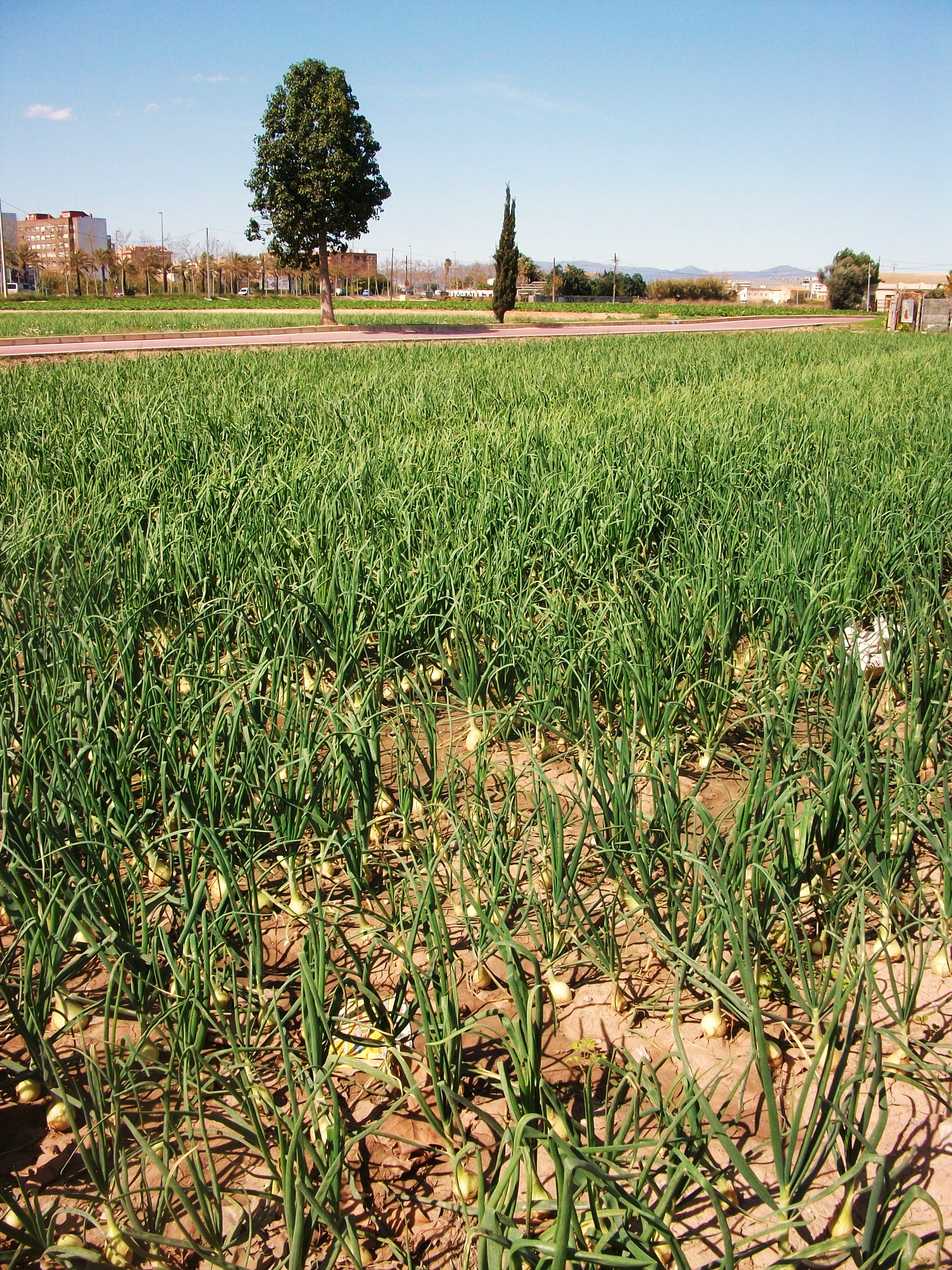 Horta de Benimaclet, davant del cementeri.